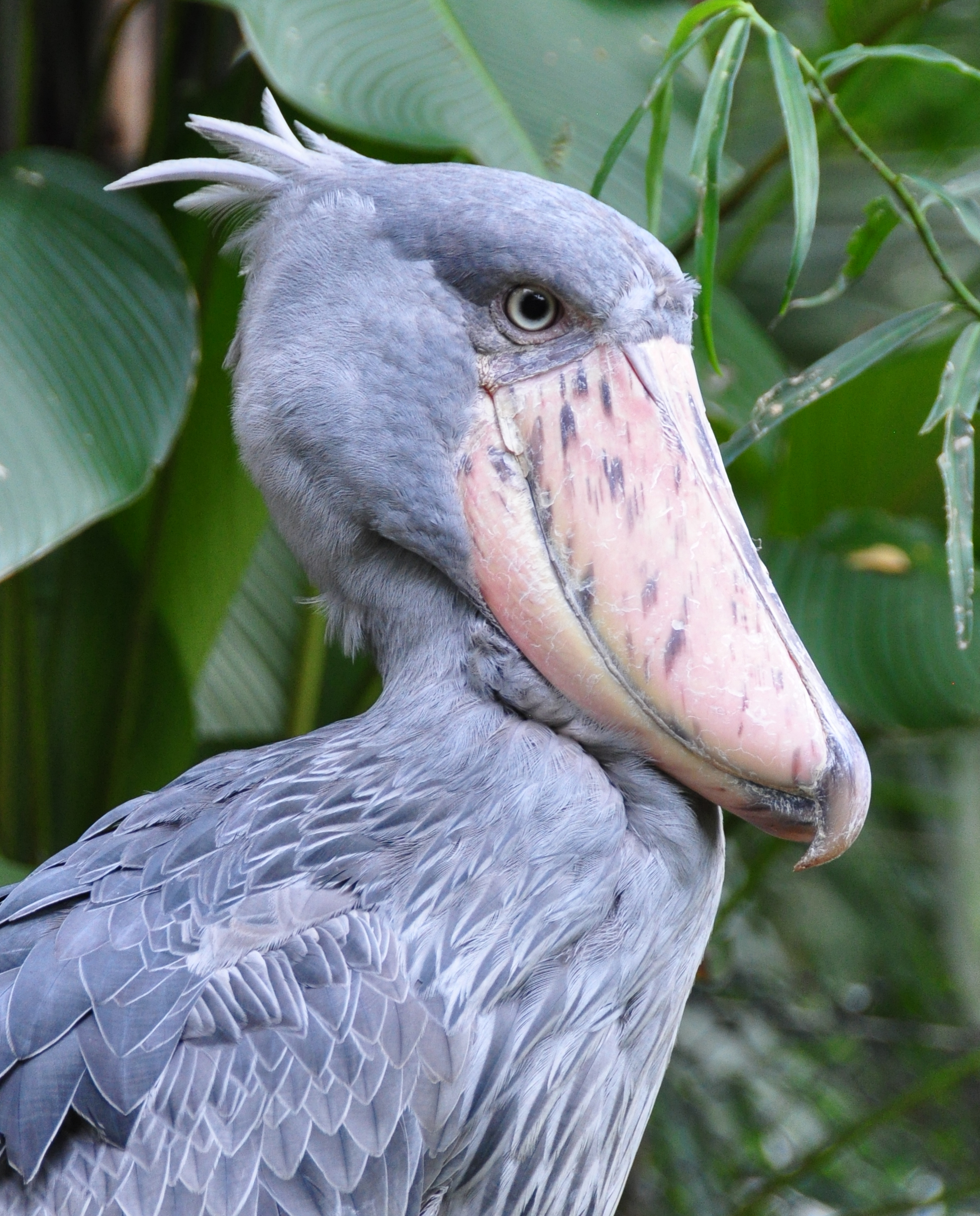 Jurong Bird Park, Singapore